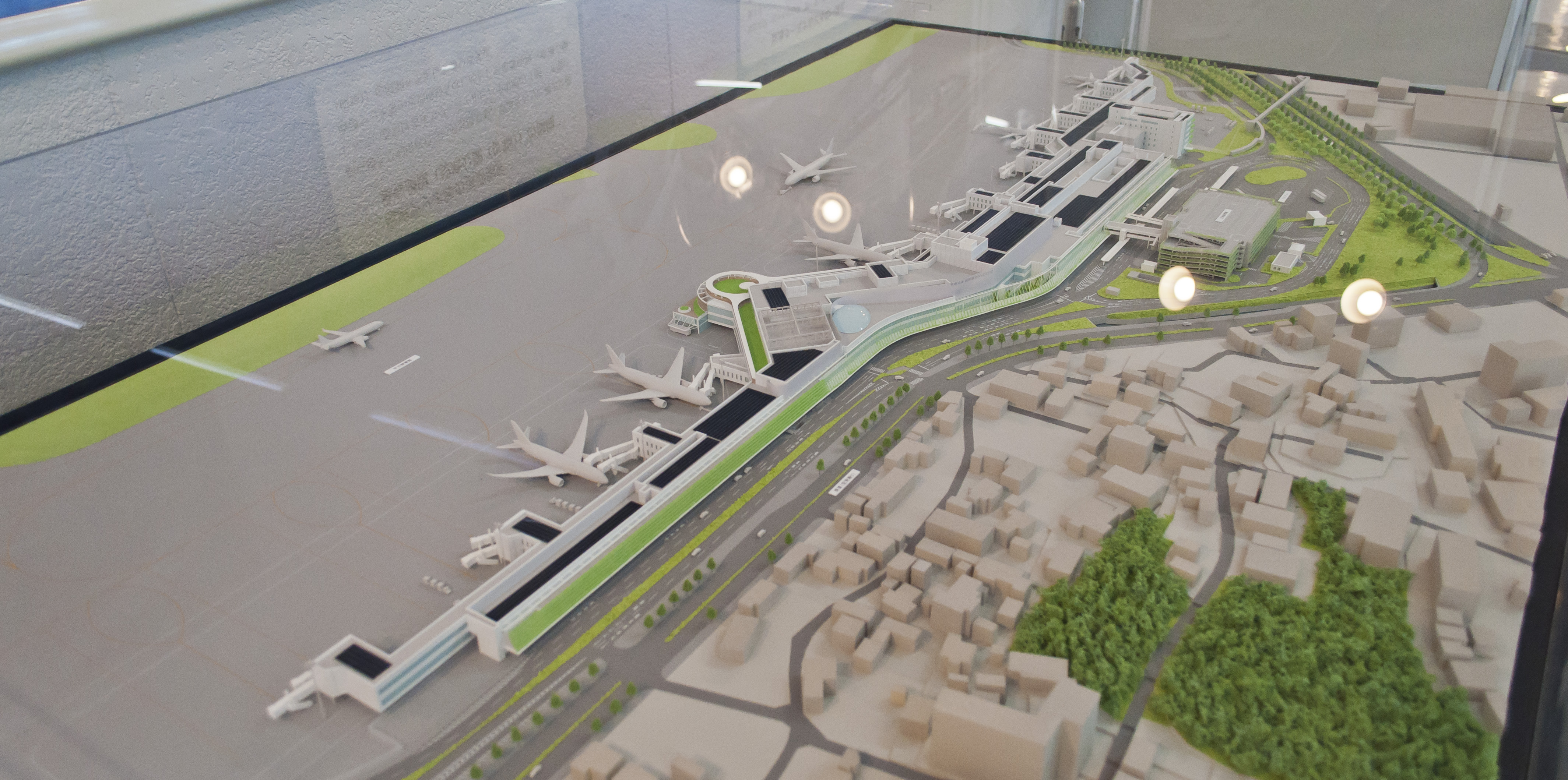 福岡空港第3ターミナルで展示されているものを撮影